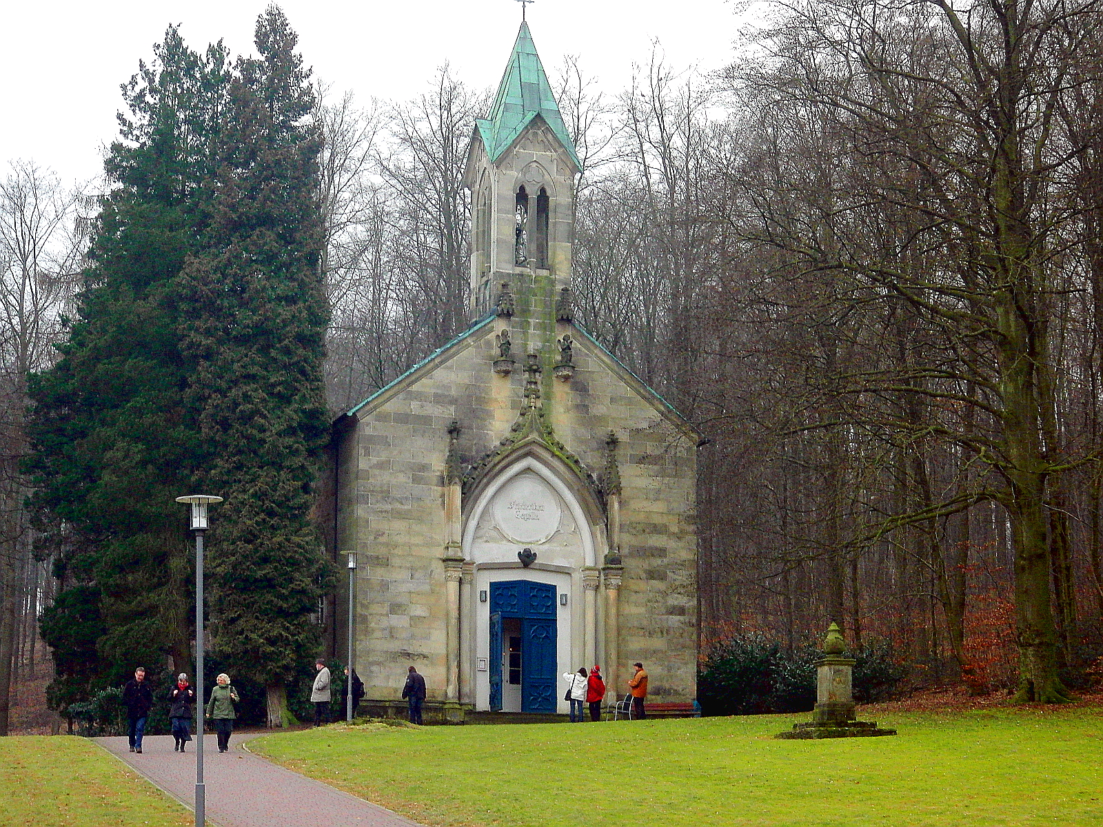 Blick im Frühjahr auf die Friederikenkapelle in Bad Rehburg